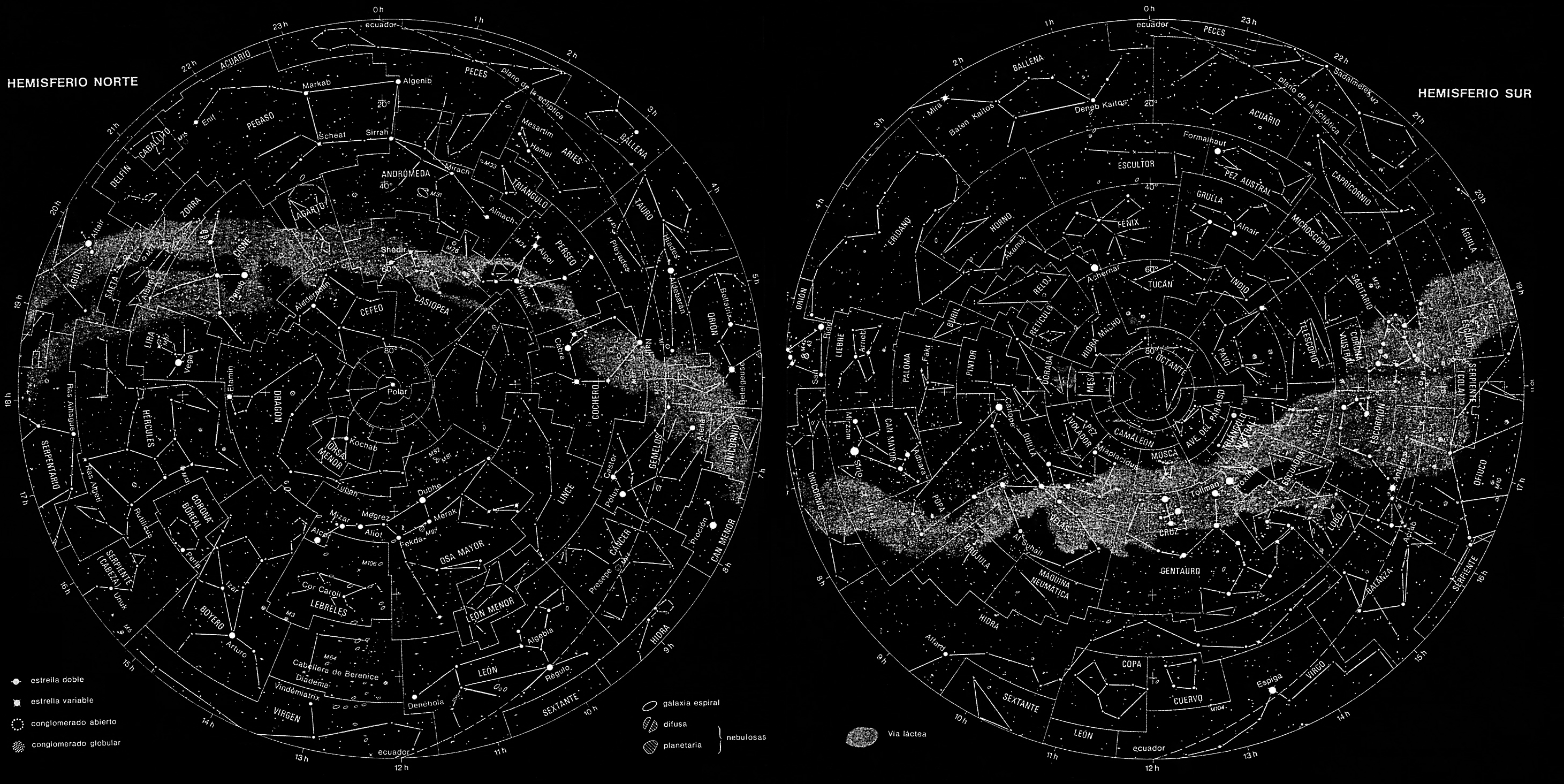 Carta celeste con los asterismos de las contelaciones